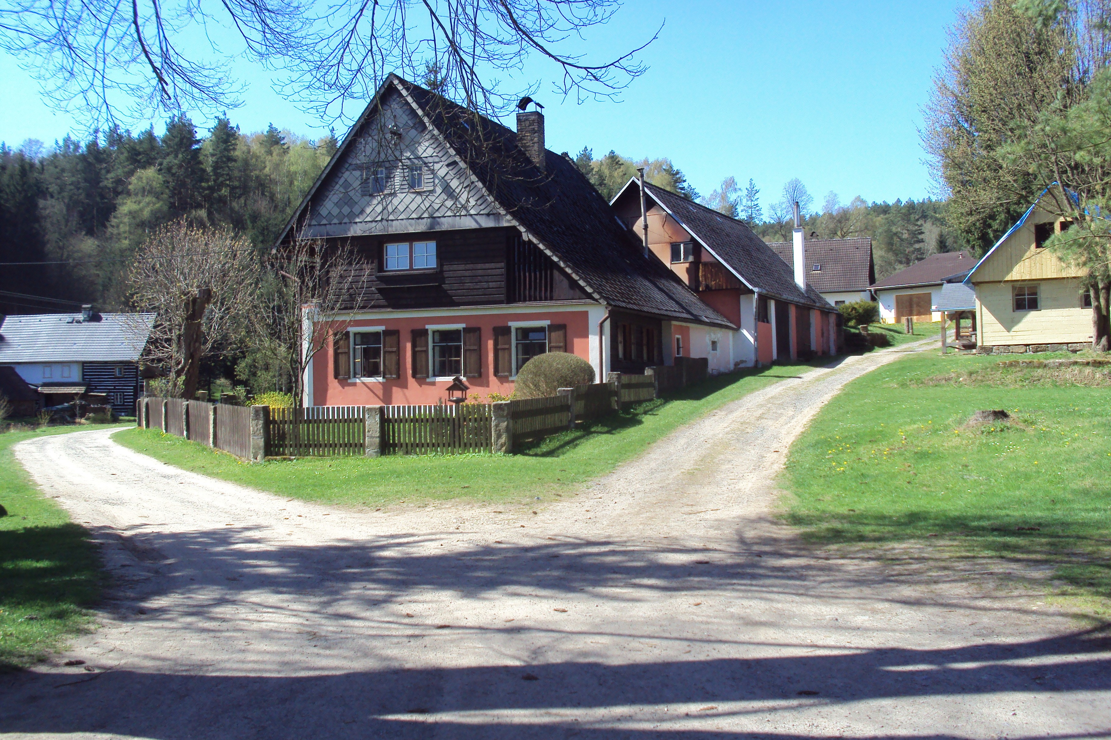 Stavení v Heřmánkách, silnice z Dřevčic do Holan